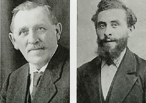 Die beiden Gründer des Unternehmens "Ramesohl und Schmidt oHG", Franz Ramesohl und Franz Schmidt